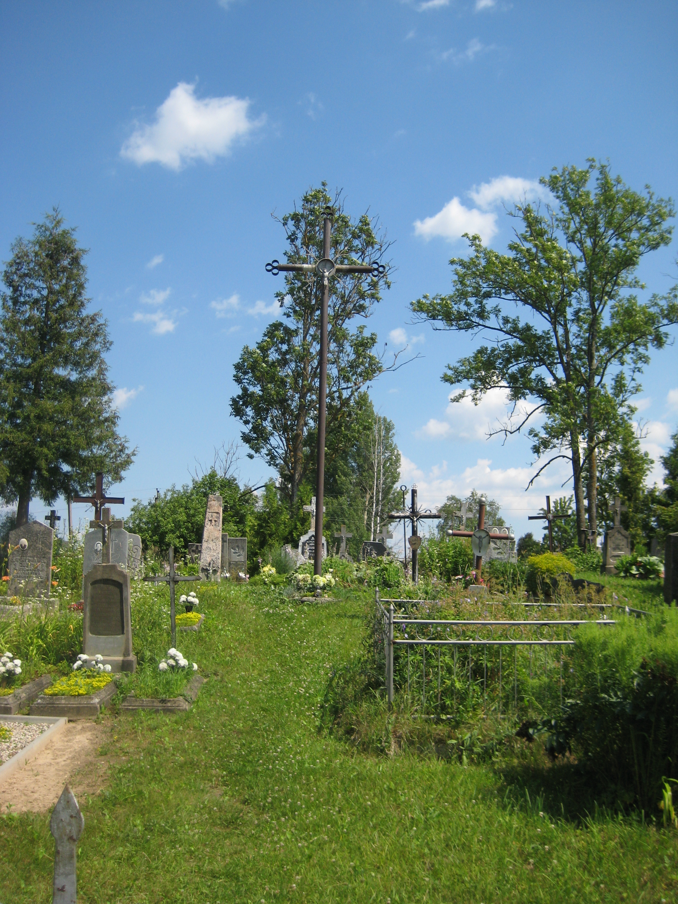 Tryčiūnai 30281, Lithuania